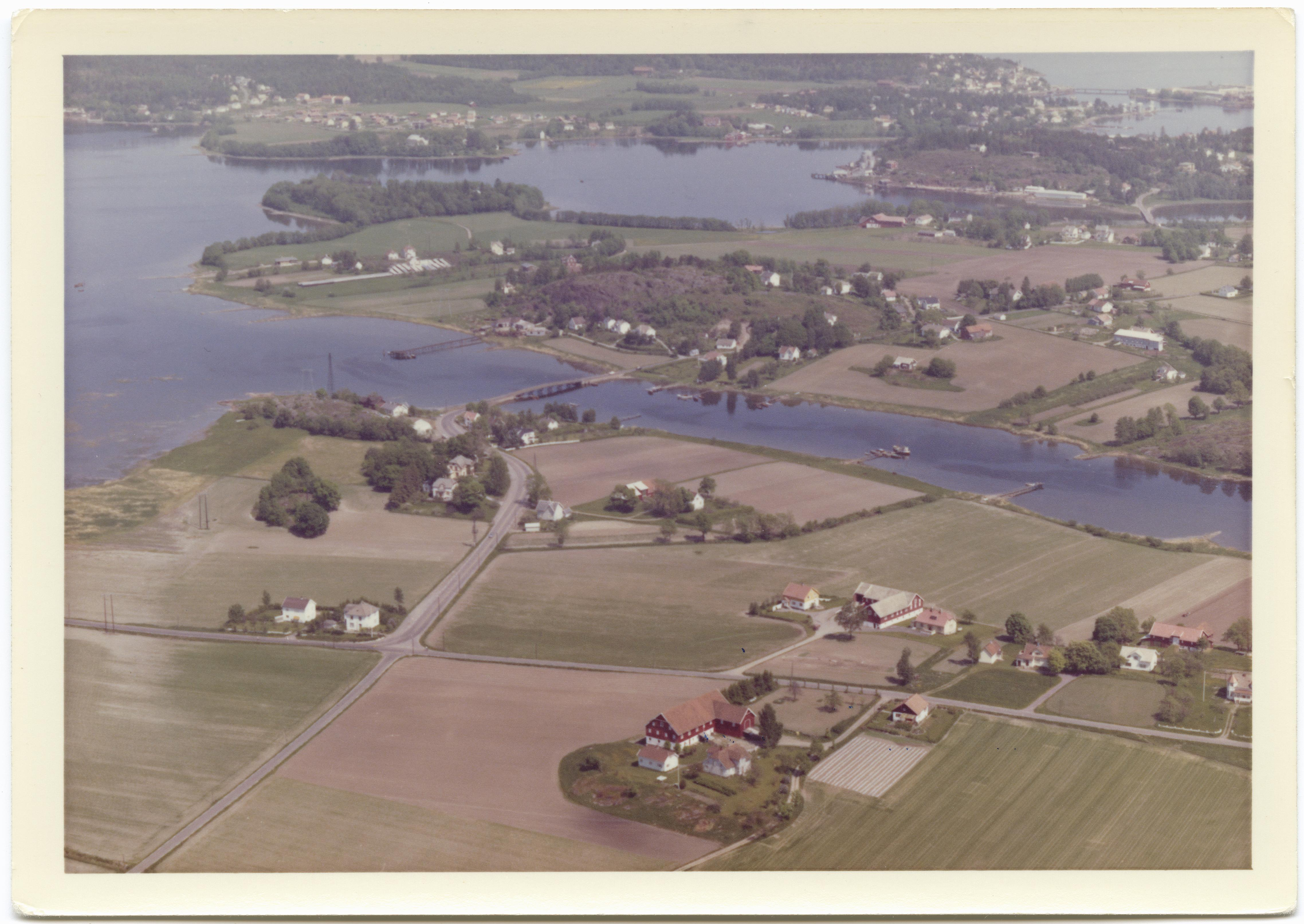 WF.S.164957